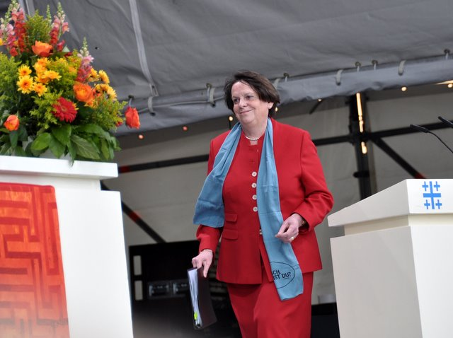 Der Kirchentag ist eröffnet - Kirchentagspräsidentin Karin von Welck, Hamburg Kirchentag Bremen 2009